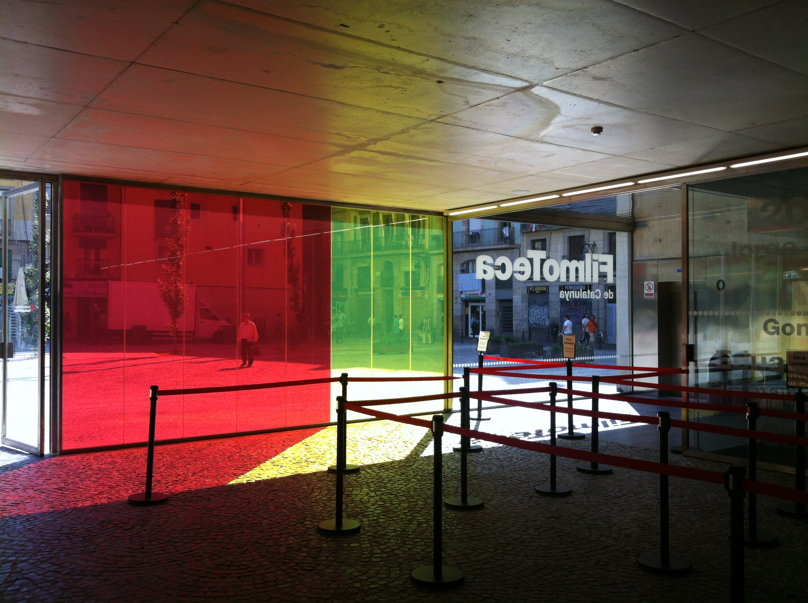 Interior Filmoteca CAT